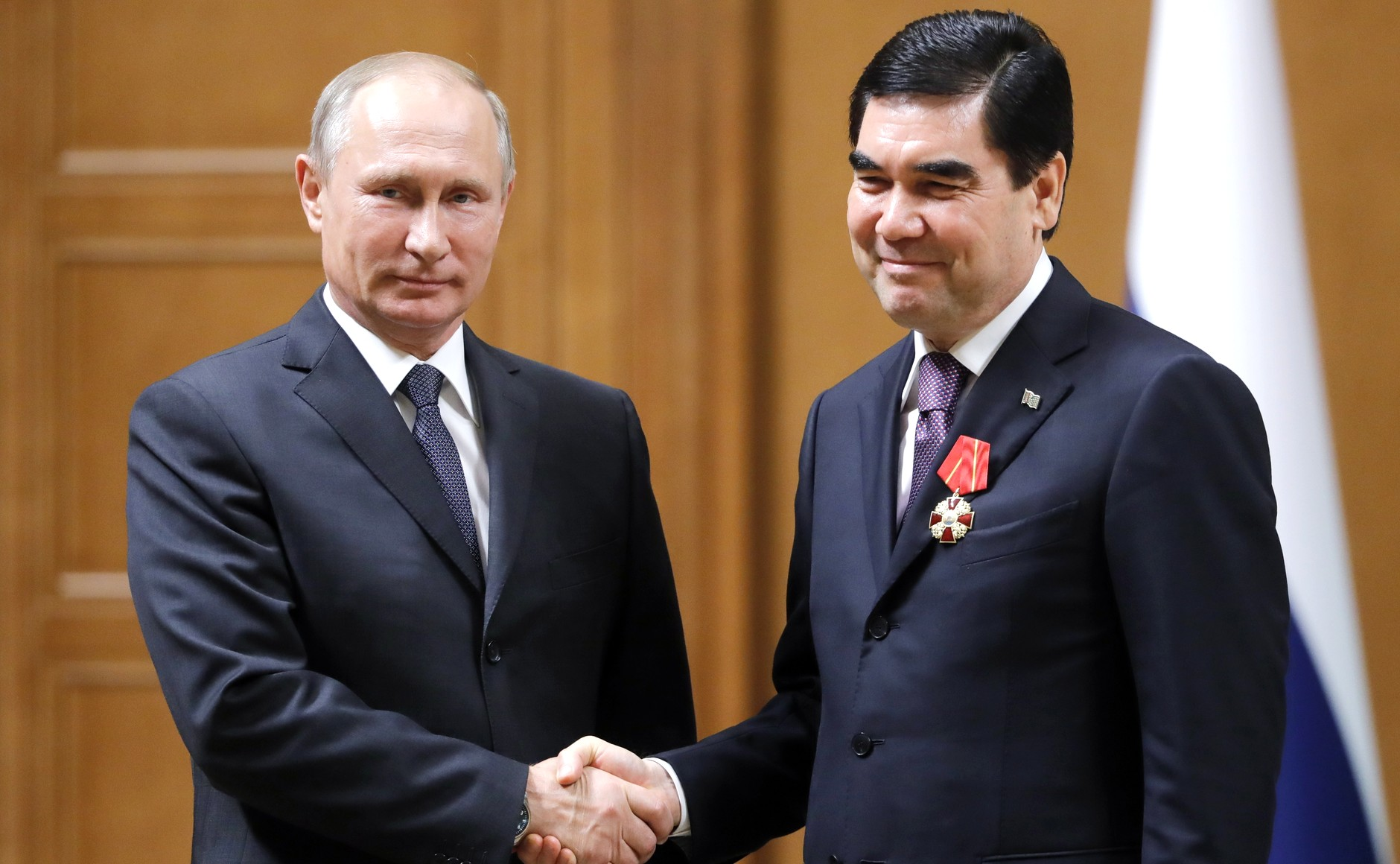 Владимир Путин вручил Президенту Туркменистана Гурбангулы Бердымухамедову государственную награду Российской Федерации – орден Александра Невского